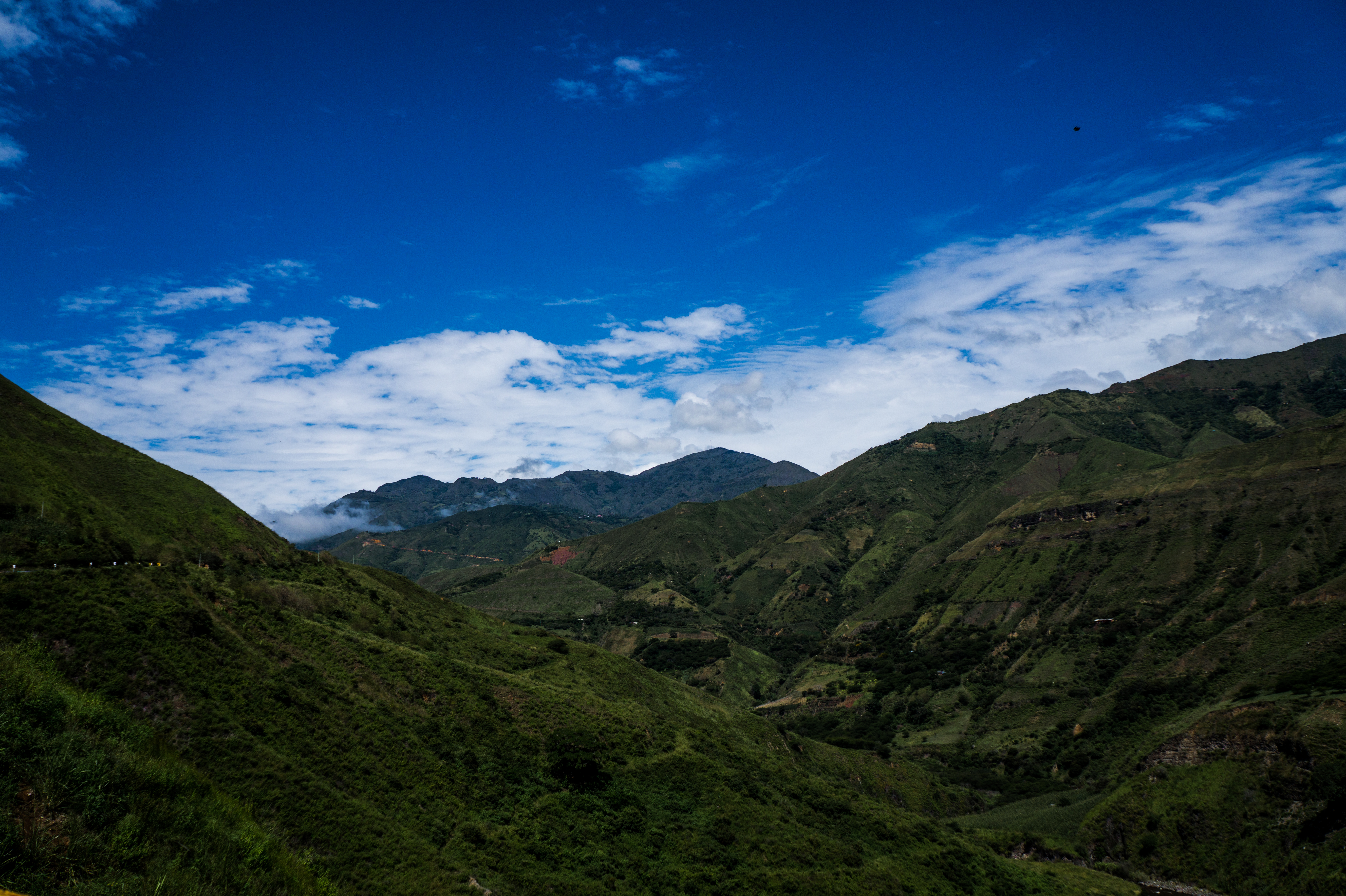 Formación natural que es atravesada por un rio famoso por la batalla del Juanambu, donde Antonio Nariño combatió al ejercicio español. Tomado desde el puente antes de llegar a Buesaco desde Arboleda. Esta fotografía fue tomada en el municipio colombiano con código 52110.